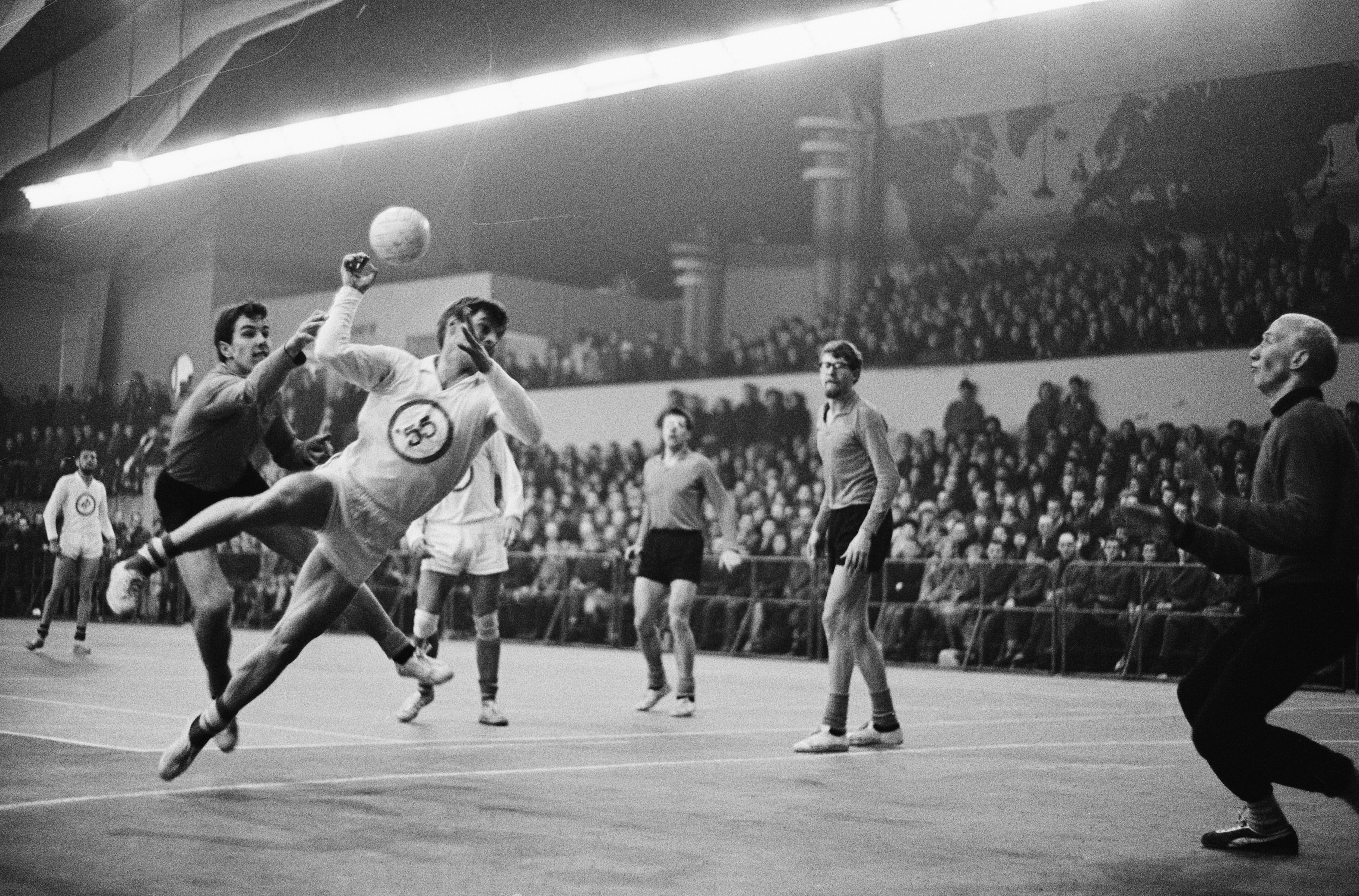 Collectie / Archief : Fotocollectie Anefo Reportage / Serie : [ onbekend ] Beschrijving : Zaalhandbal Operatie 55 tegen Niloc 11-10, aanval Operatie, in donker shirt Peter Verhaar (N) Datum : 6 maart 1965 Locatie : Den Haag, Zuid-Holland Trefwoorden : handbal, sport Persoonsnaam : Verhaar Peter Instellingsnaam : Niloc, Operatie 55 Fotograaf : Steinmeier, Hans / Anefo Auteursrechthebbende : Nationaal Archief Materiaalsoort : Negatief (zwart/wit) Nummer archiefinventaris : bekijk toegang 2.24.01.05 Bestanddeelnummer : 917-5050